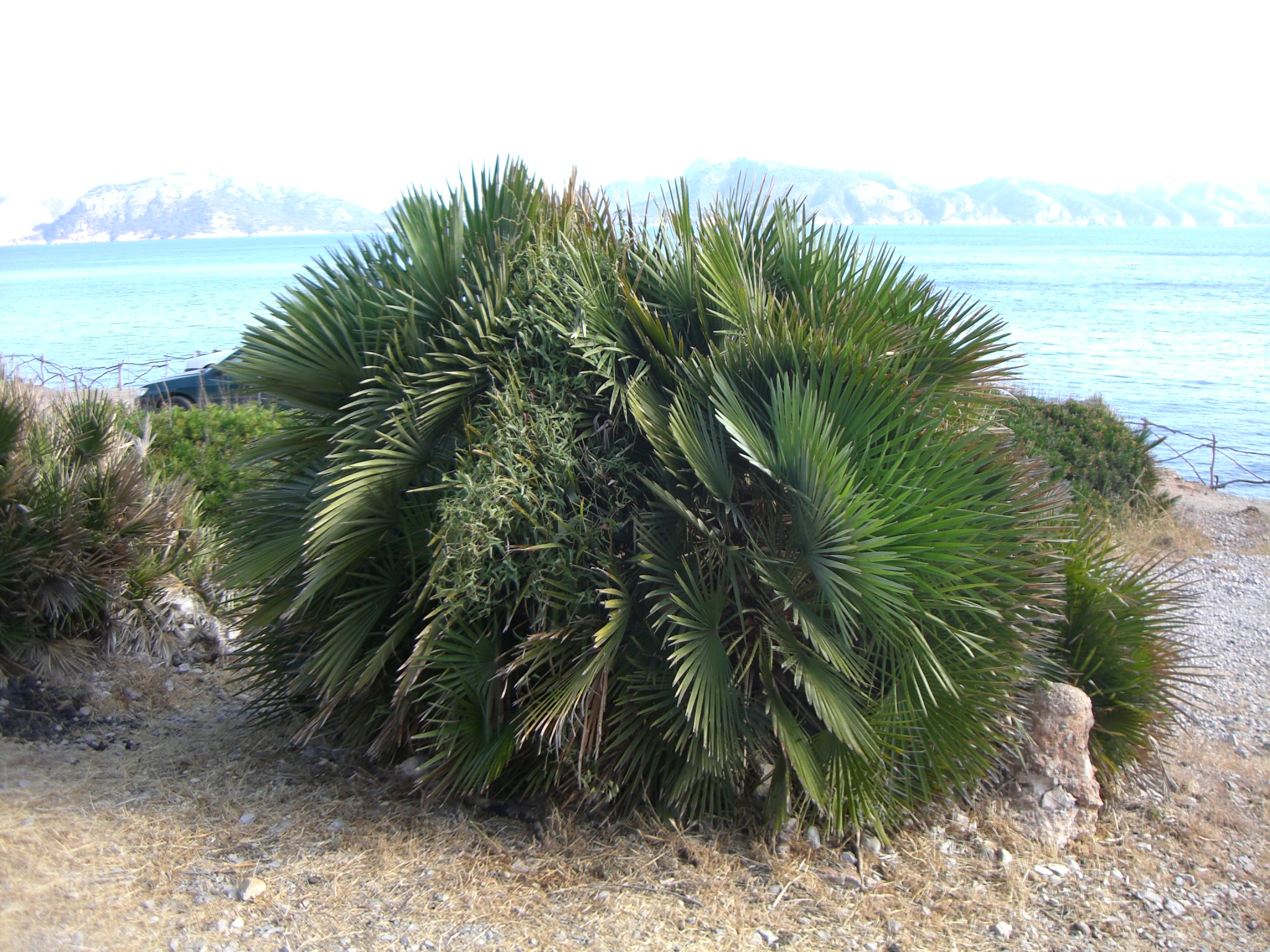 Garballó (Chamaerops humilis). La Victòria, Alcúdia, Mallorca.